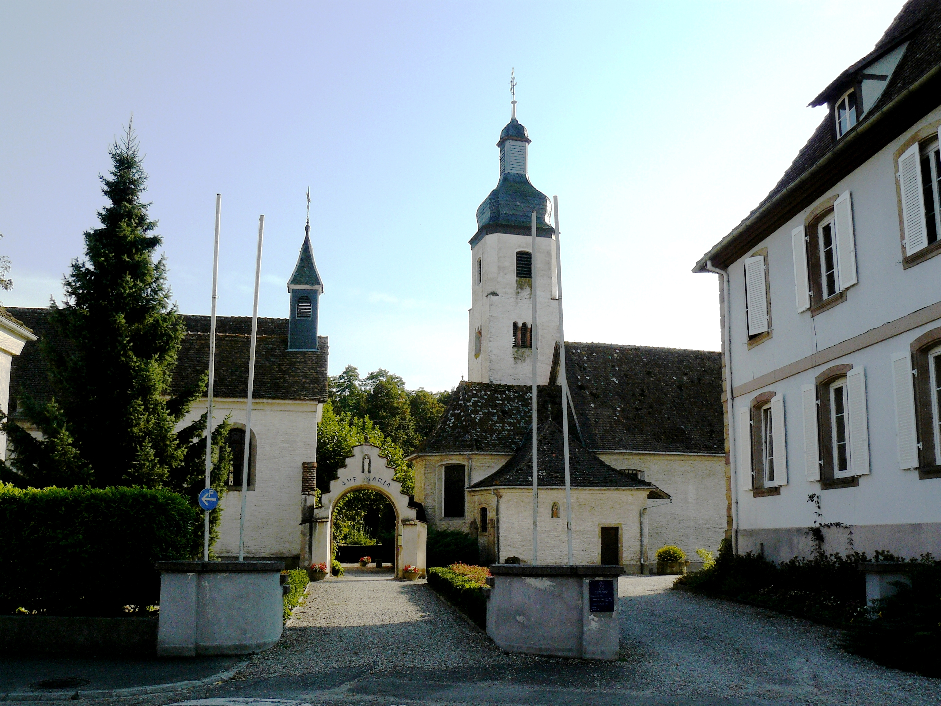 Pèlerinage de Notre Dame de Neunkirch